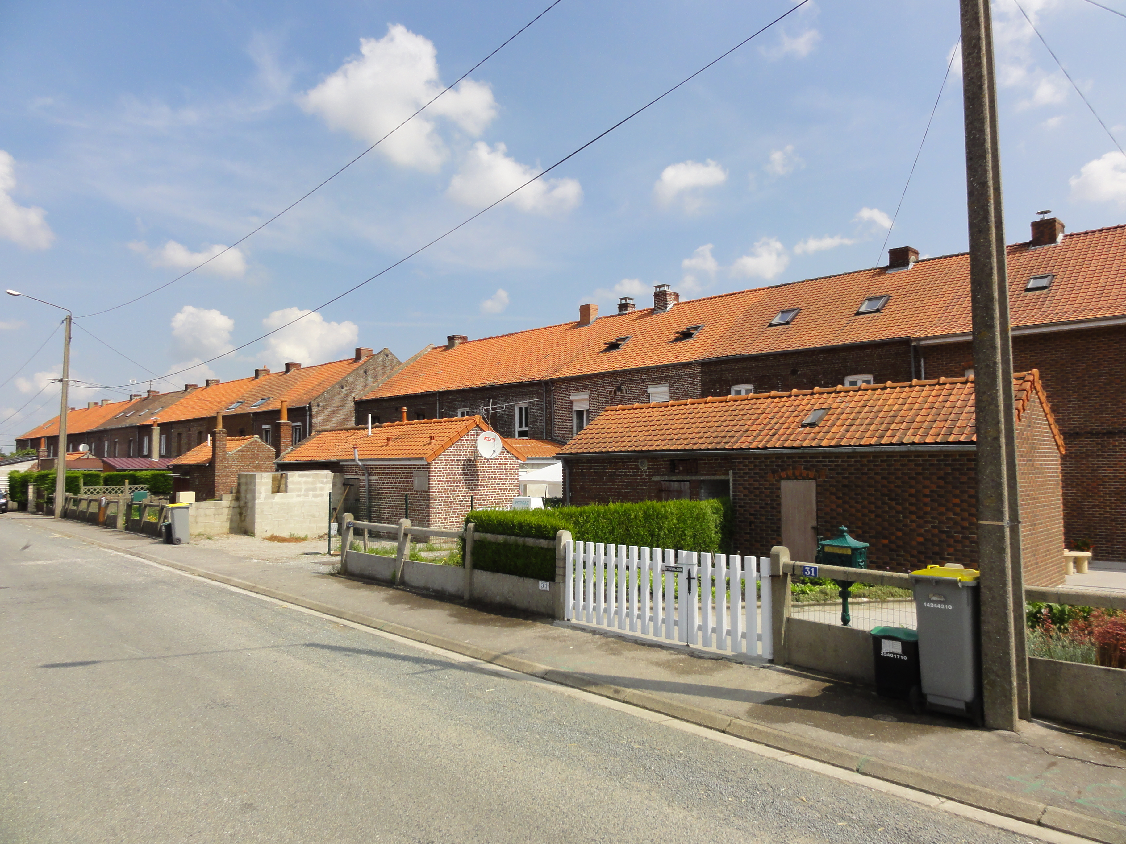 Cité de Fléchinelle de la fosse n° 1 - 1 bis de la Compagnie des mines de Ligny-lès-Aire dans le bassin minier du Nord-Pas-de-Calais, Enquin-les-Mines, Pas-de-Calais, Nord-Pas-de-Calais, France.